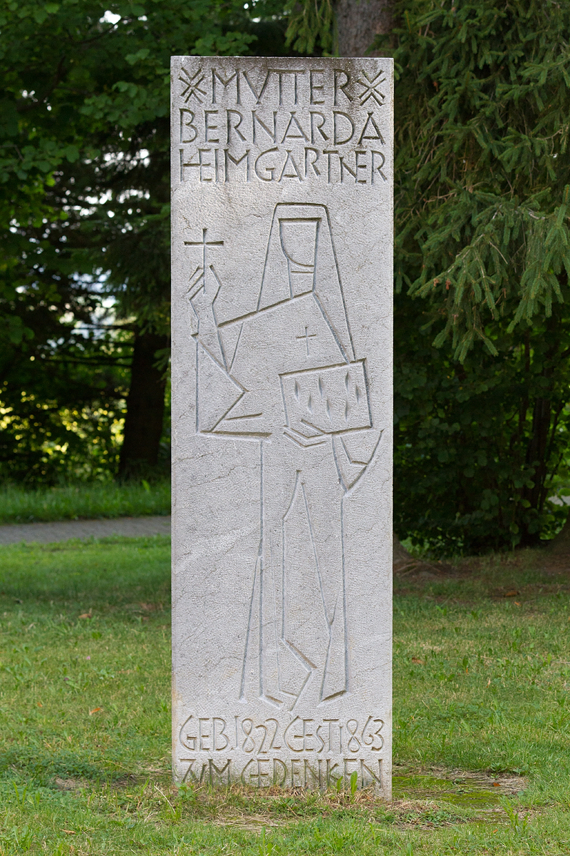 Gedenkstein an Mutter Bernarda Heimgartner, der Begründerin des Ordens der Schwestern vom Heiligen Kreuz Menzingen